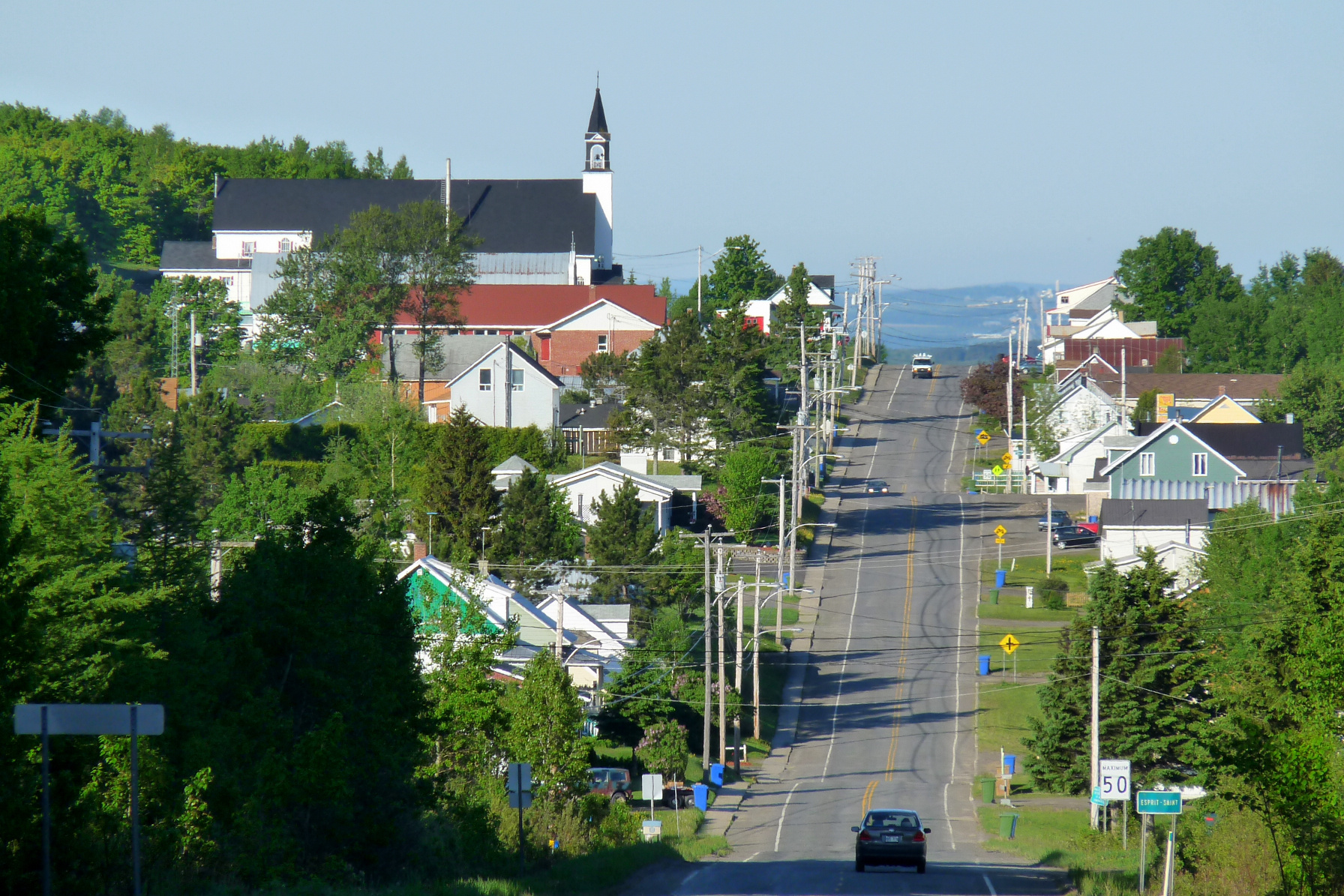 Village d'esprit-Saint, dans la MRC de Rimouski-Neigette, au Bas-Saint-Laurent (Québec), vu de la route 232